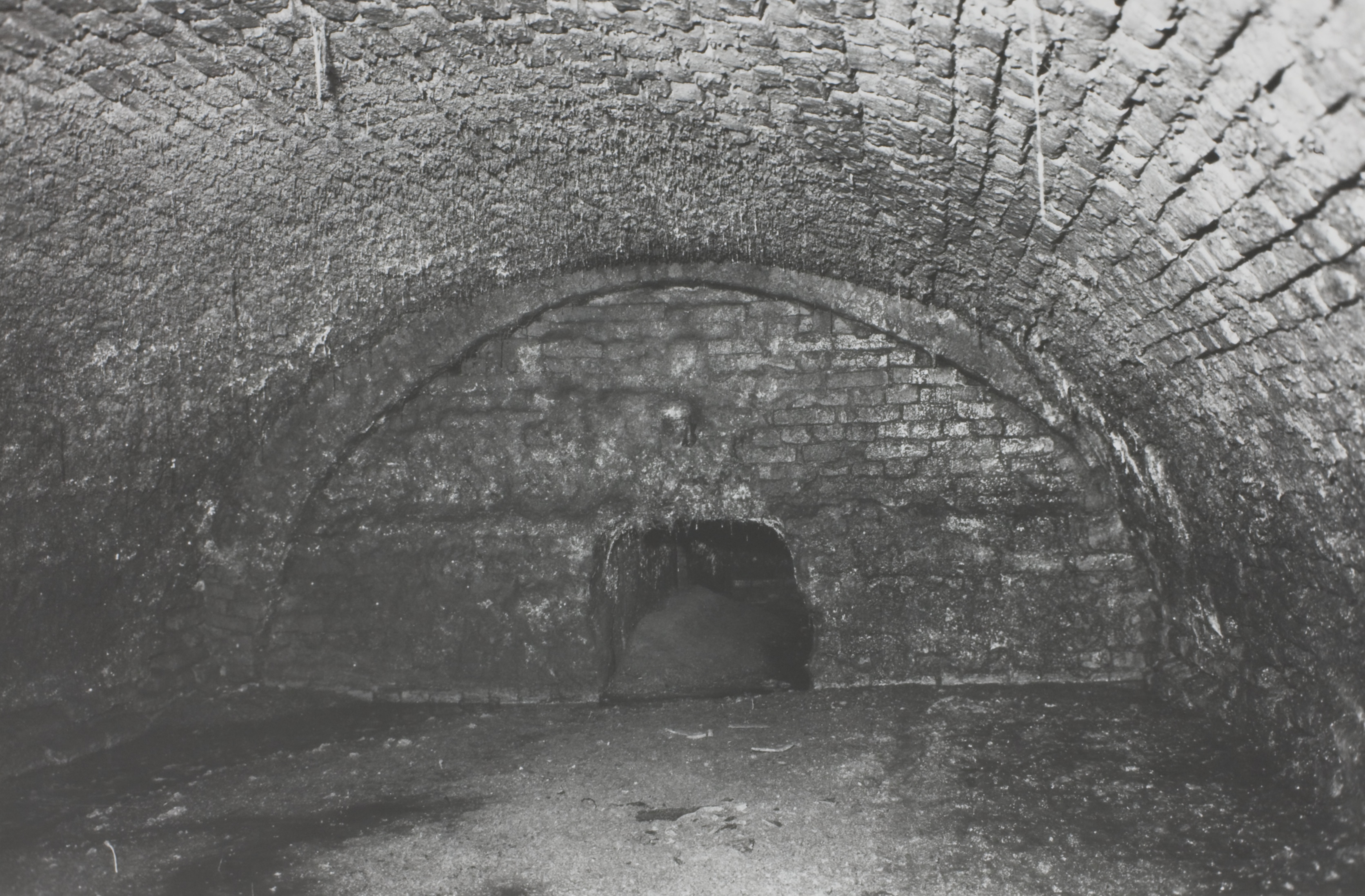 Kelder onder Kloksteeg 13 in Leiden. Deel van de overkluizing van de voormalige Donkeregracht.